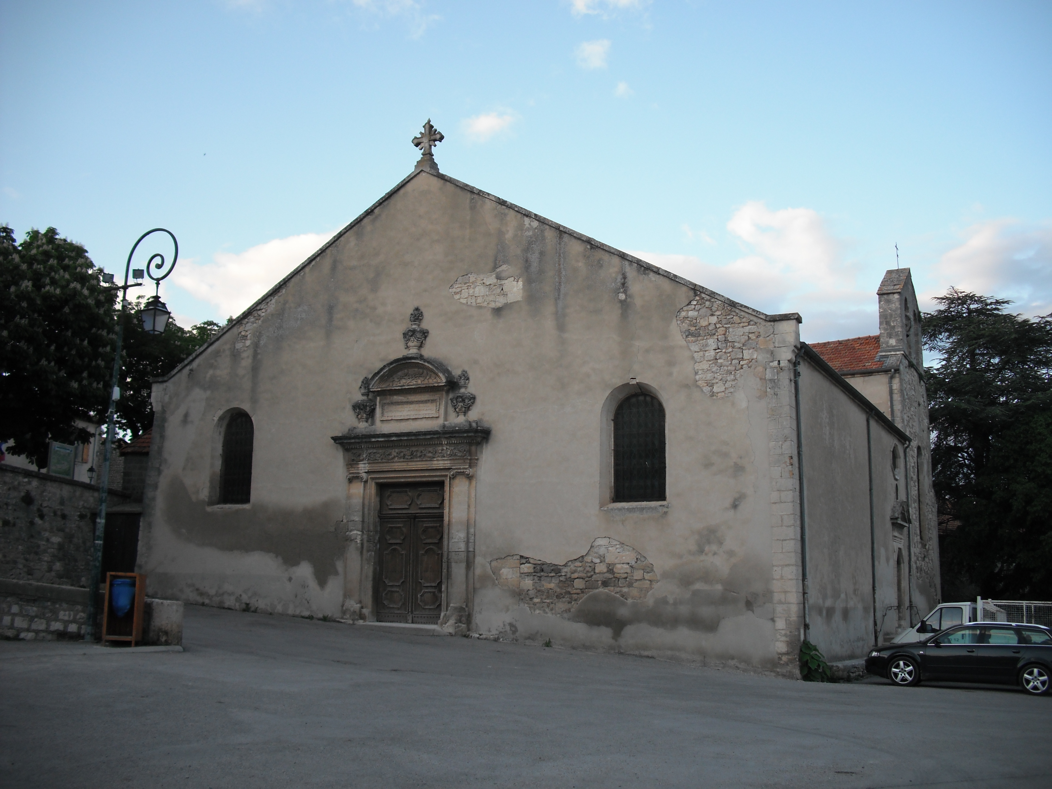 Église de Reillanne (Alpes-de-Haute-Provence)